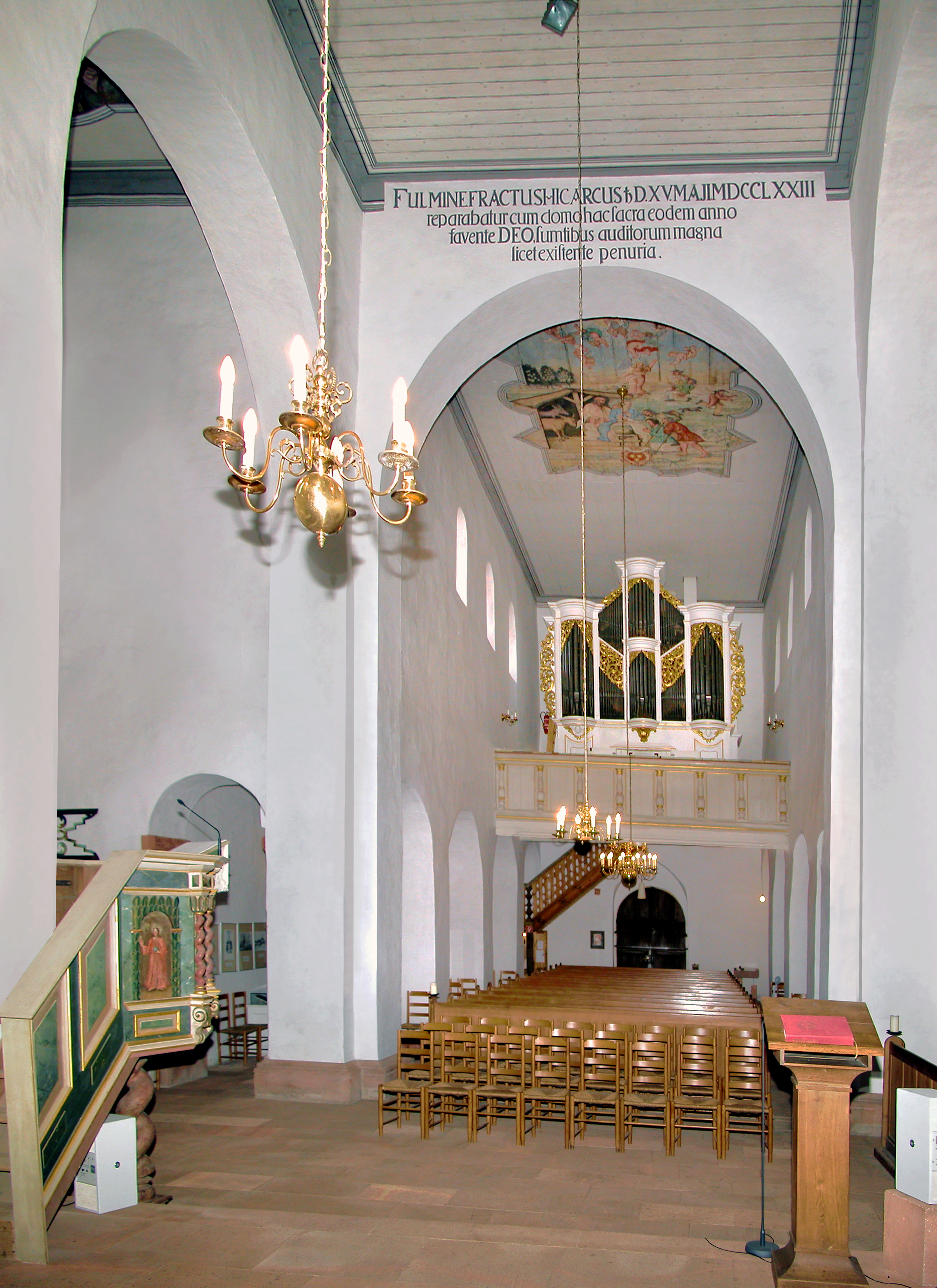 13.05.2009 04651 Bad Lausick: Stadtkirche St. Kilian. Dreischiffige romanische Pfeilerbasilika, 12. Jh. Orgel 1722 von Gottfried Silbermann, ergänzt 1791 von Johann Gottlieb Trampeli. [DSCN37401-02.TIF]20090513400MDR.JPG(c)Blobelt